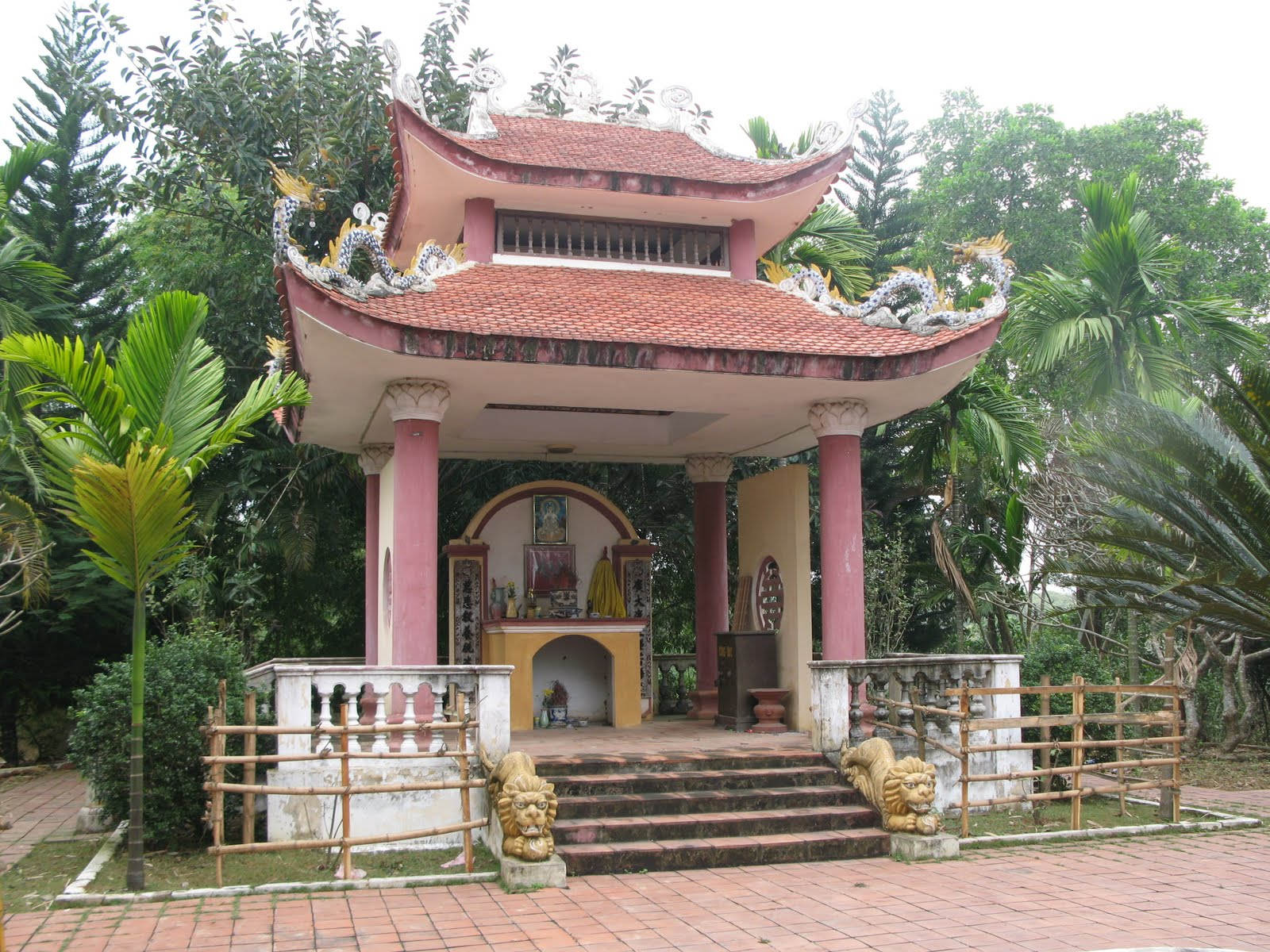 Đài thờ các bậc anh linh "Từ hàng quảng tế" trên một hòn đảo ở giữa Đầm Ao Châu, Hạ Hòa, Phú Thọ